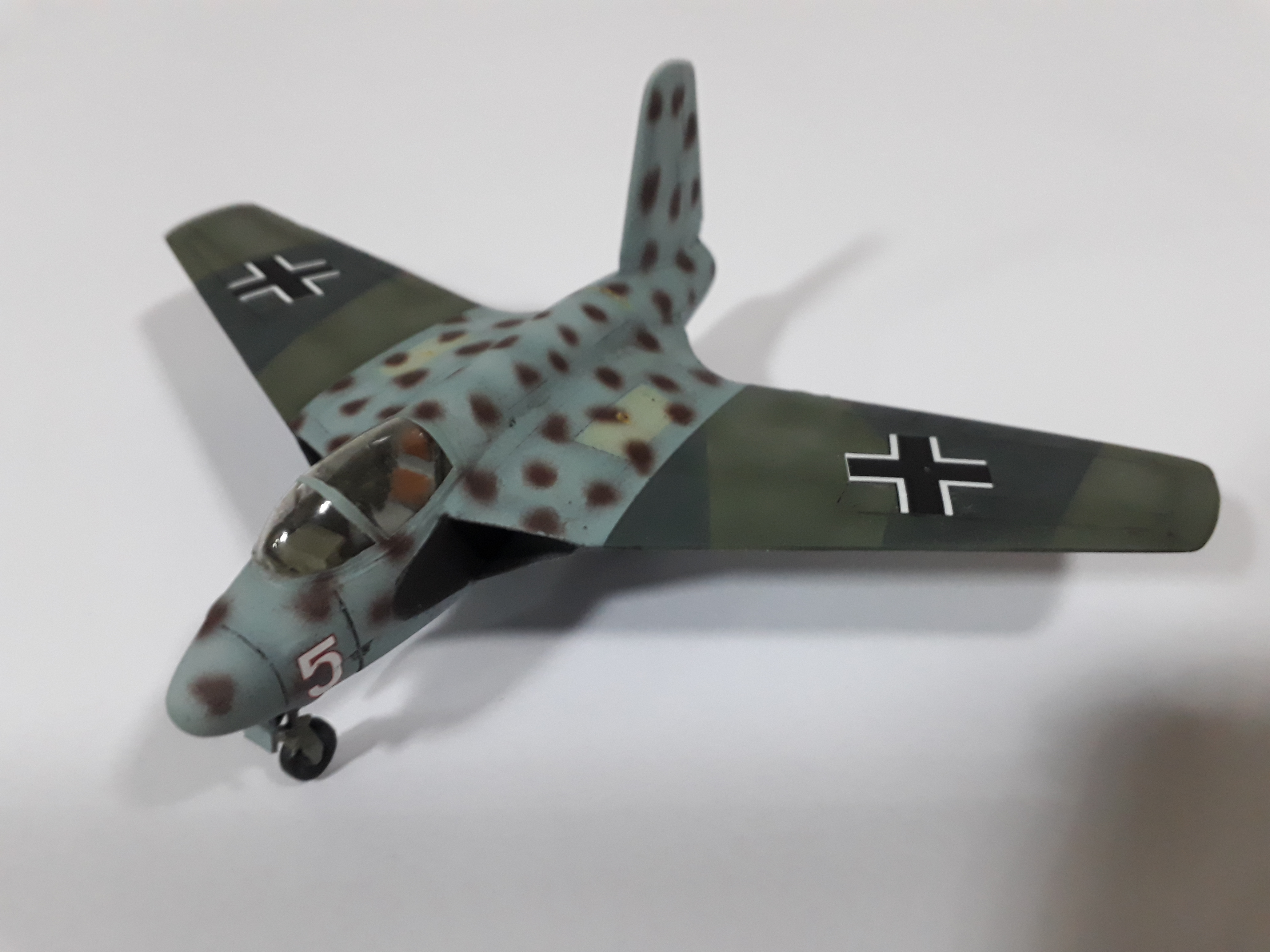 Modelo a escala del Lippisch P.15